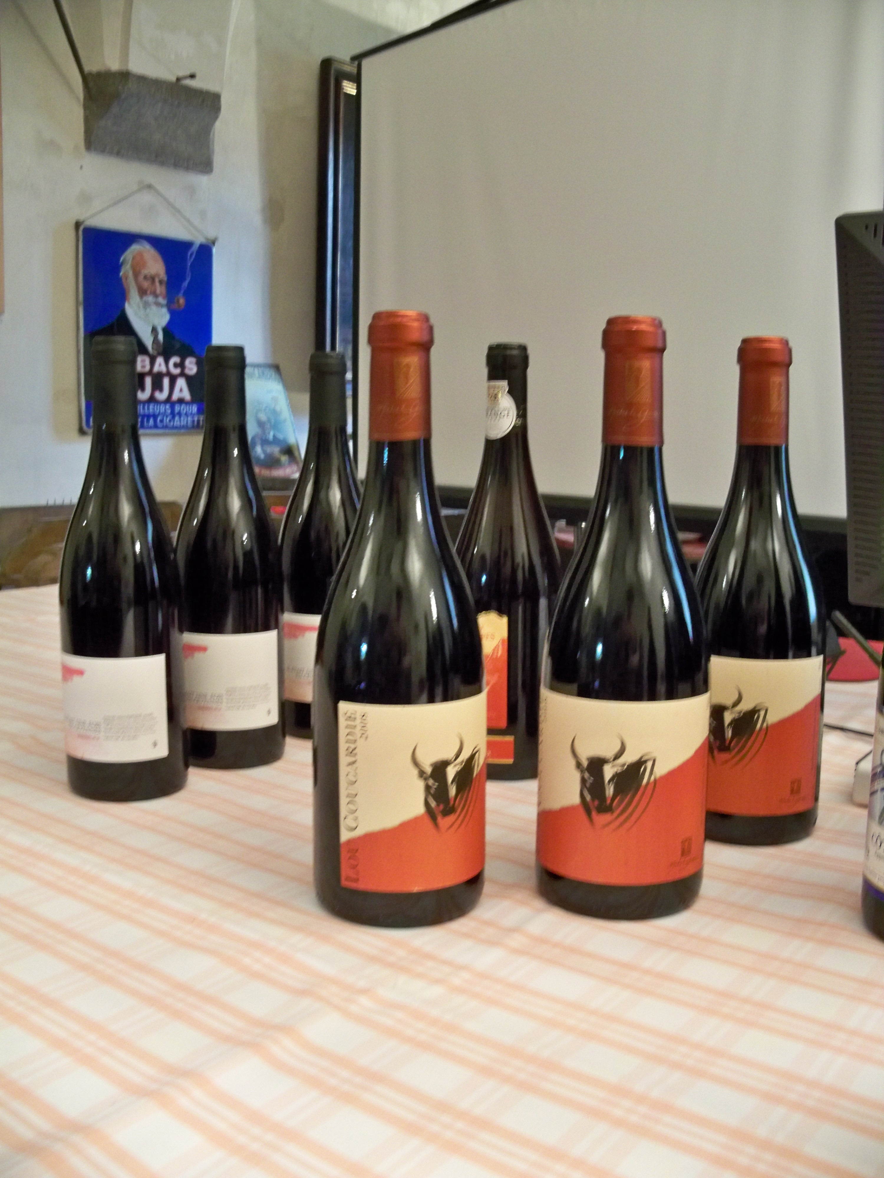 Bouteilles de vin Costières de Nîmes AOC à la Conférence sur le vin de la vallée du Rhône méridionale, à la ferme castrale d'Hermalle-sous-Huy.